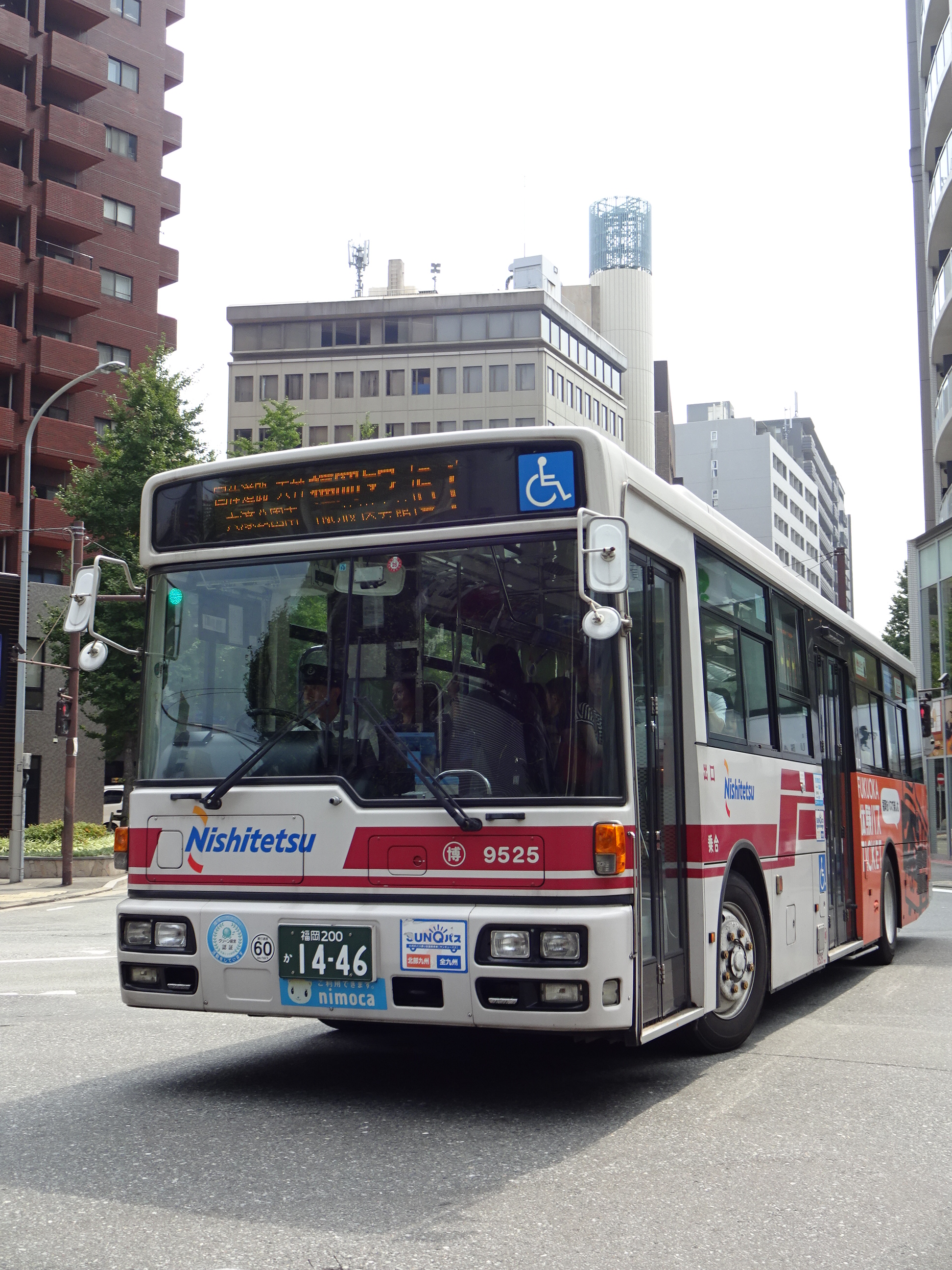 西鉄バス 博多駅～西新線（6-1番） キャナルイーストビル前で撮影